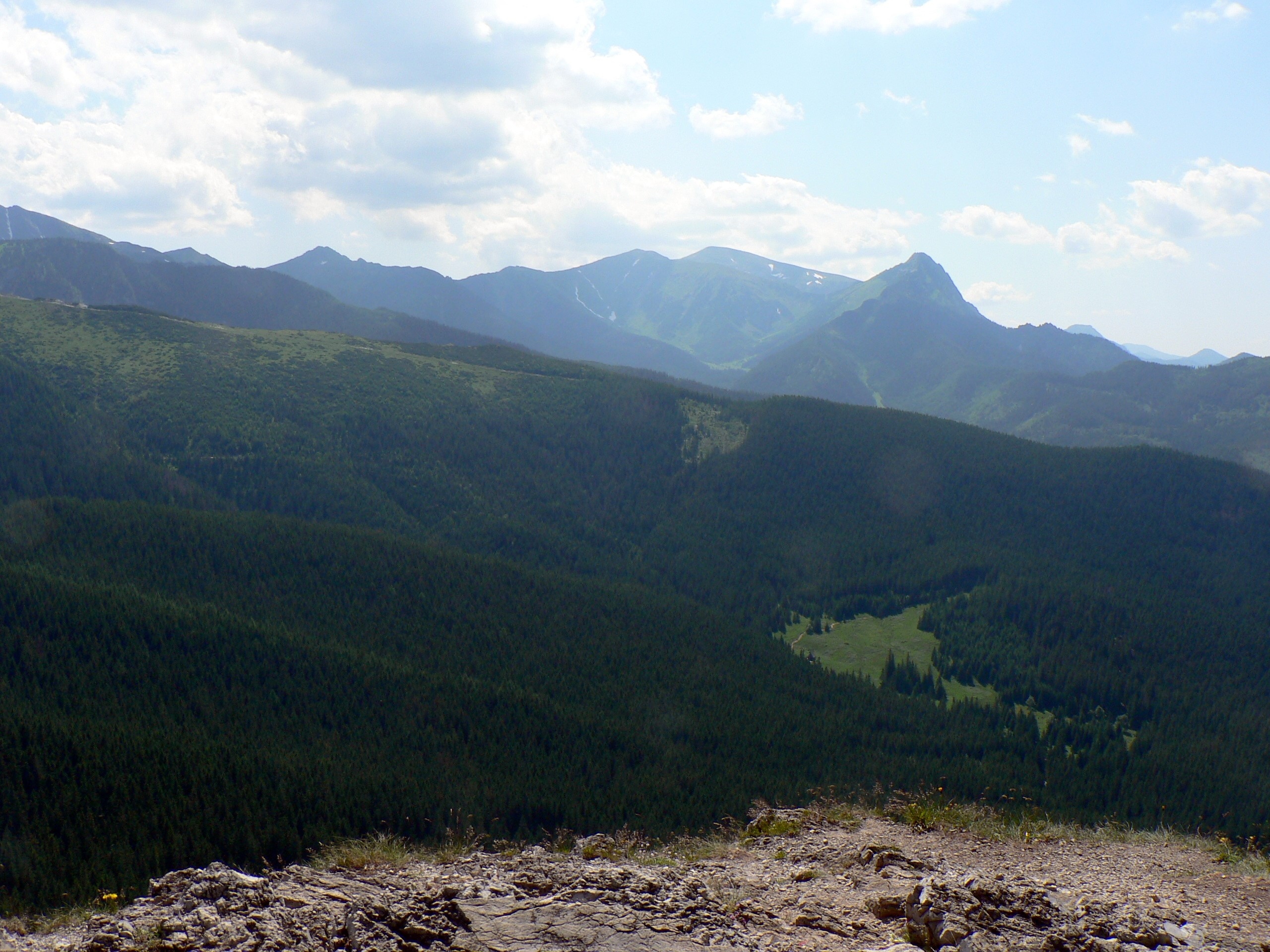 Widok z Wielkiego Kopieńca na Skupniów Upłaz i Czerwone Wierchy